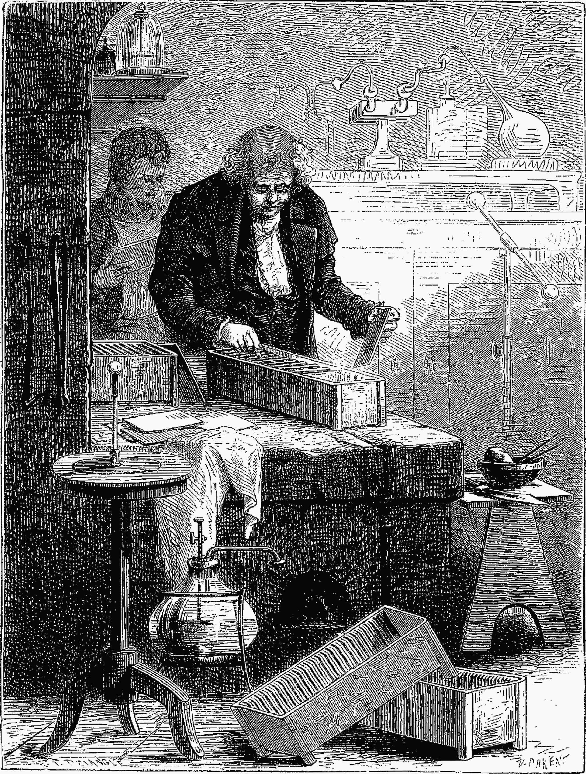 Cruikshank construit la pile à auges